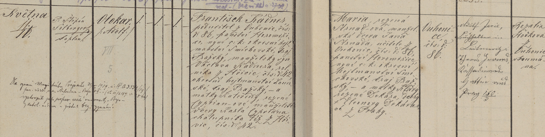 Zápis matriky narození (Úhonice 09) Otakara Kádnera ze dne 11. 5. 1870